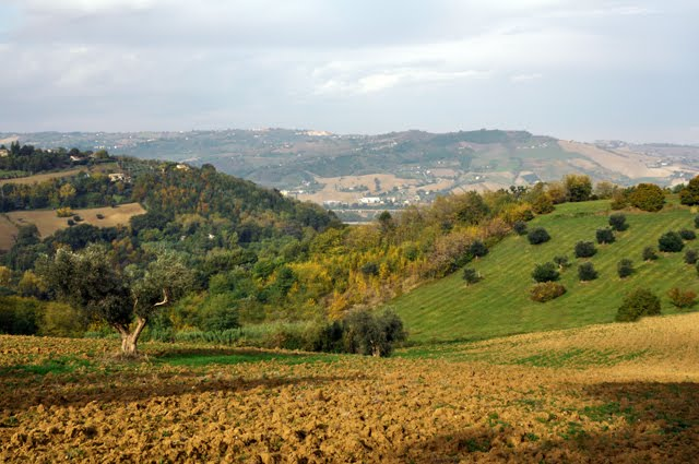 Una visuale delle tante campagne comunali